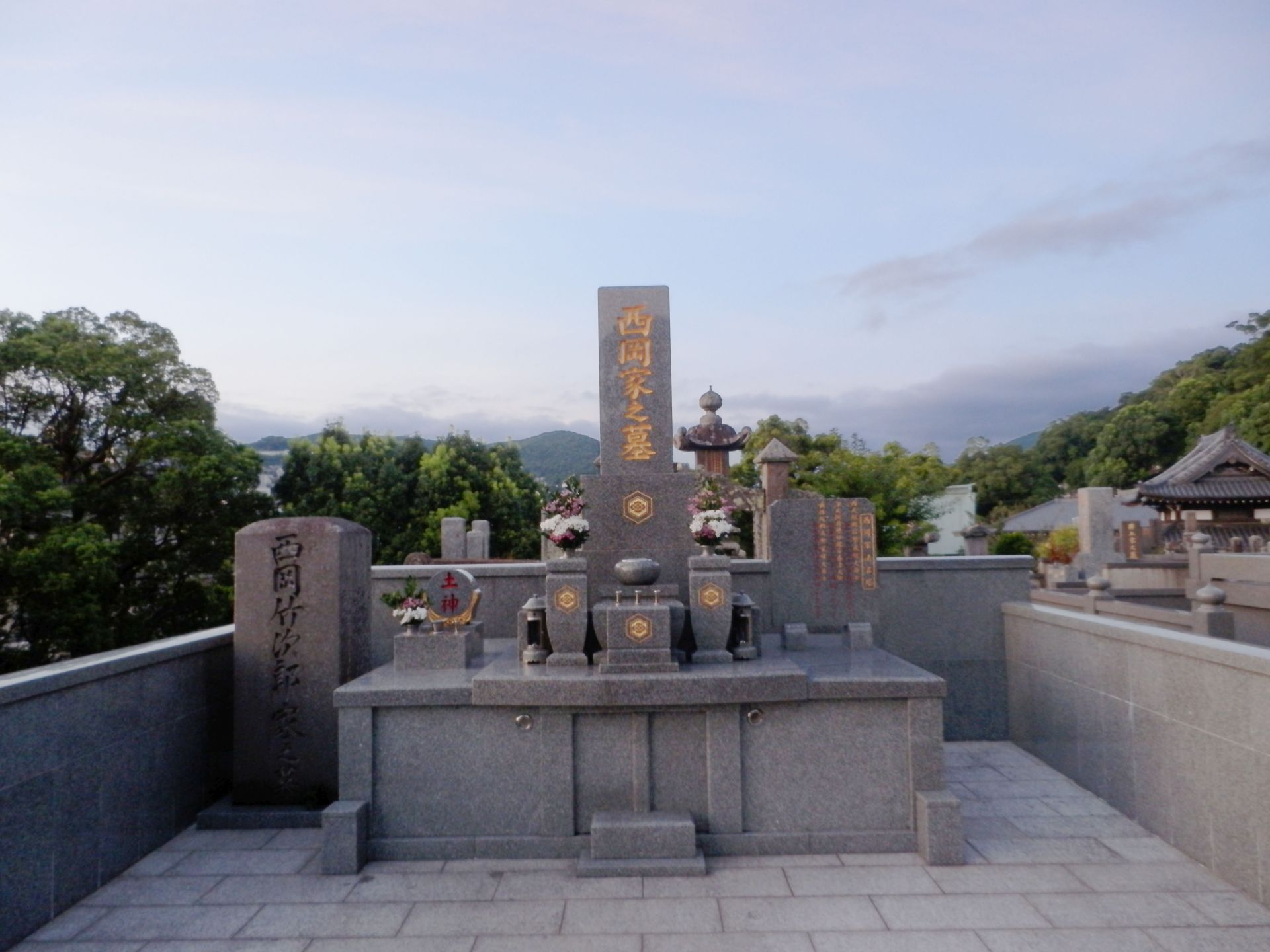 西岡竹次郎ら西岡氏の墓